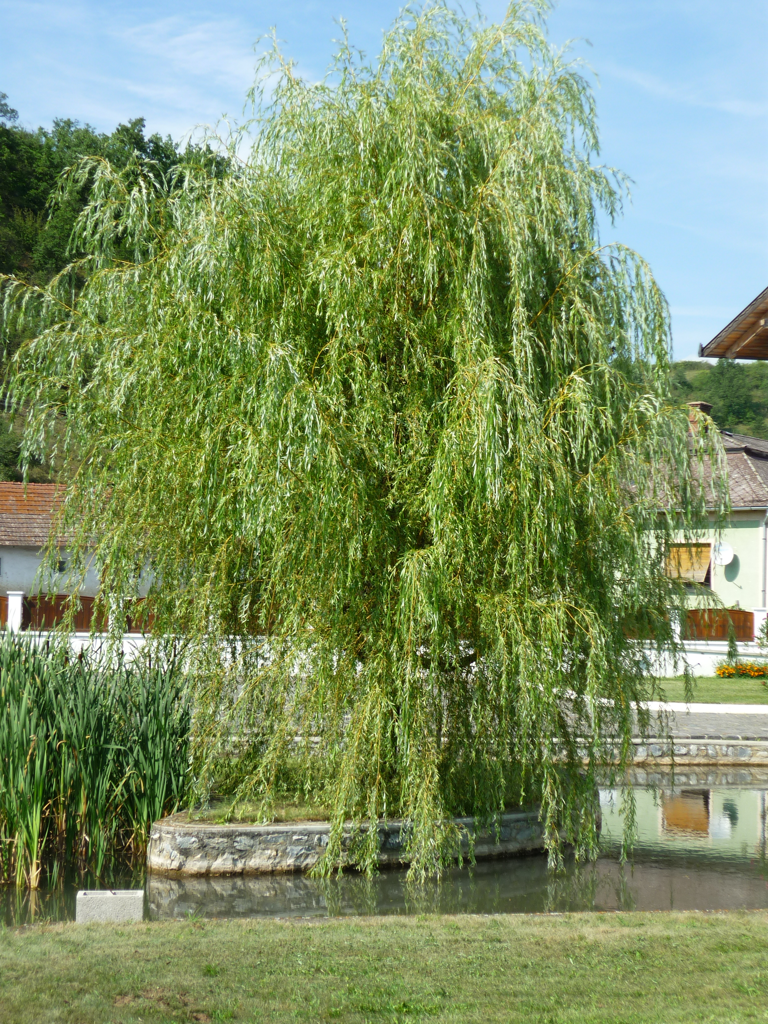 Európai szomorúfűz (Salix alba x babylonica), Szinpetri